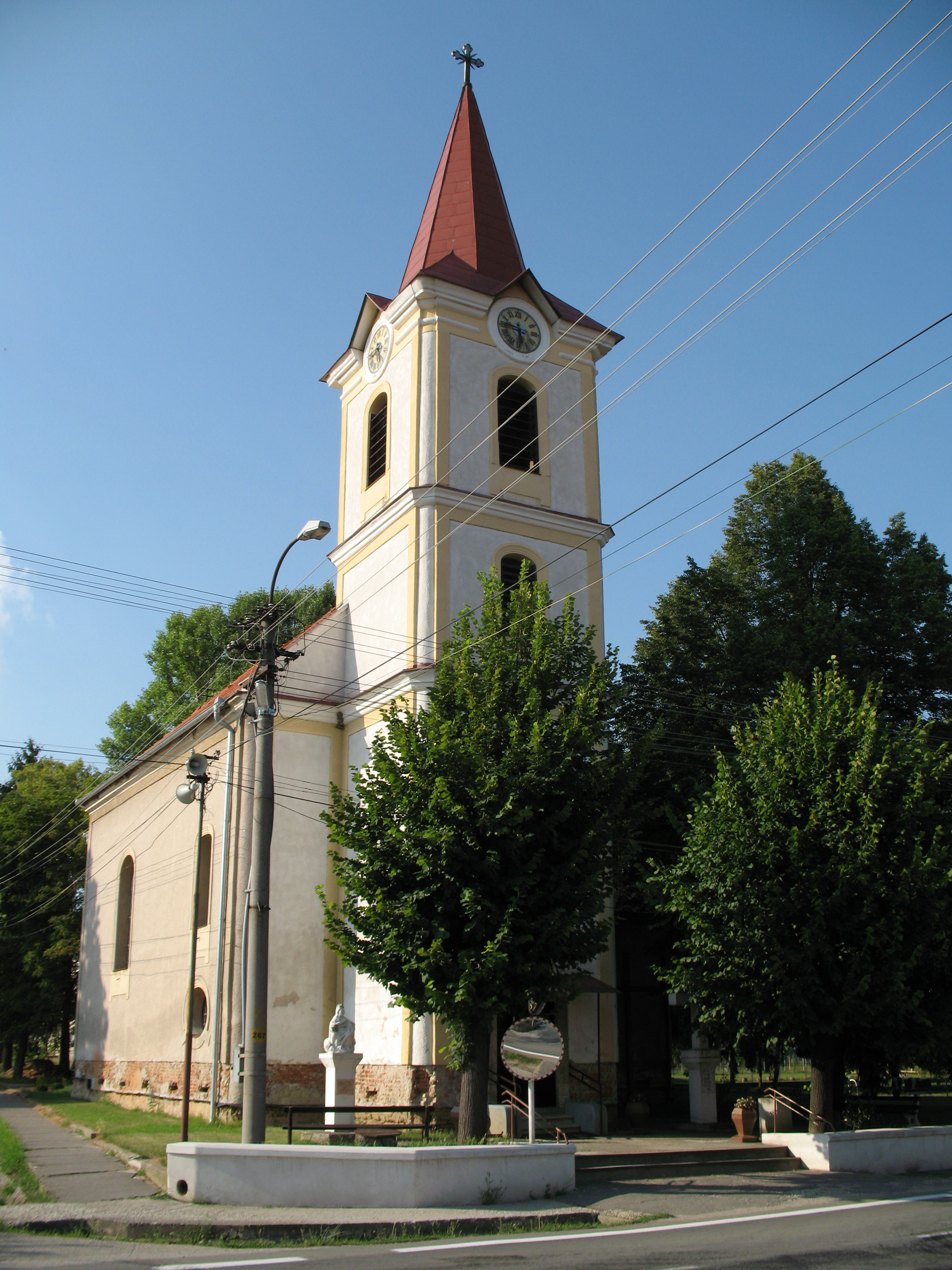 Kolta